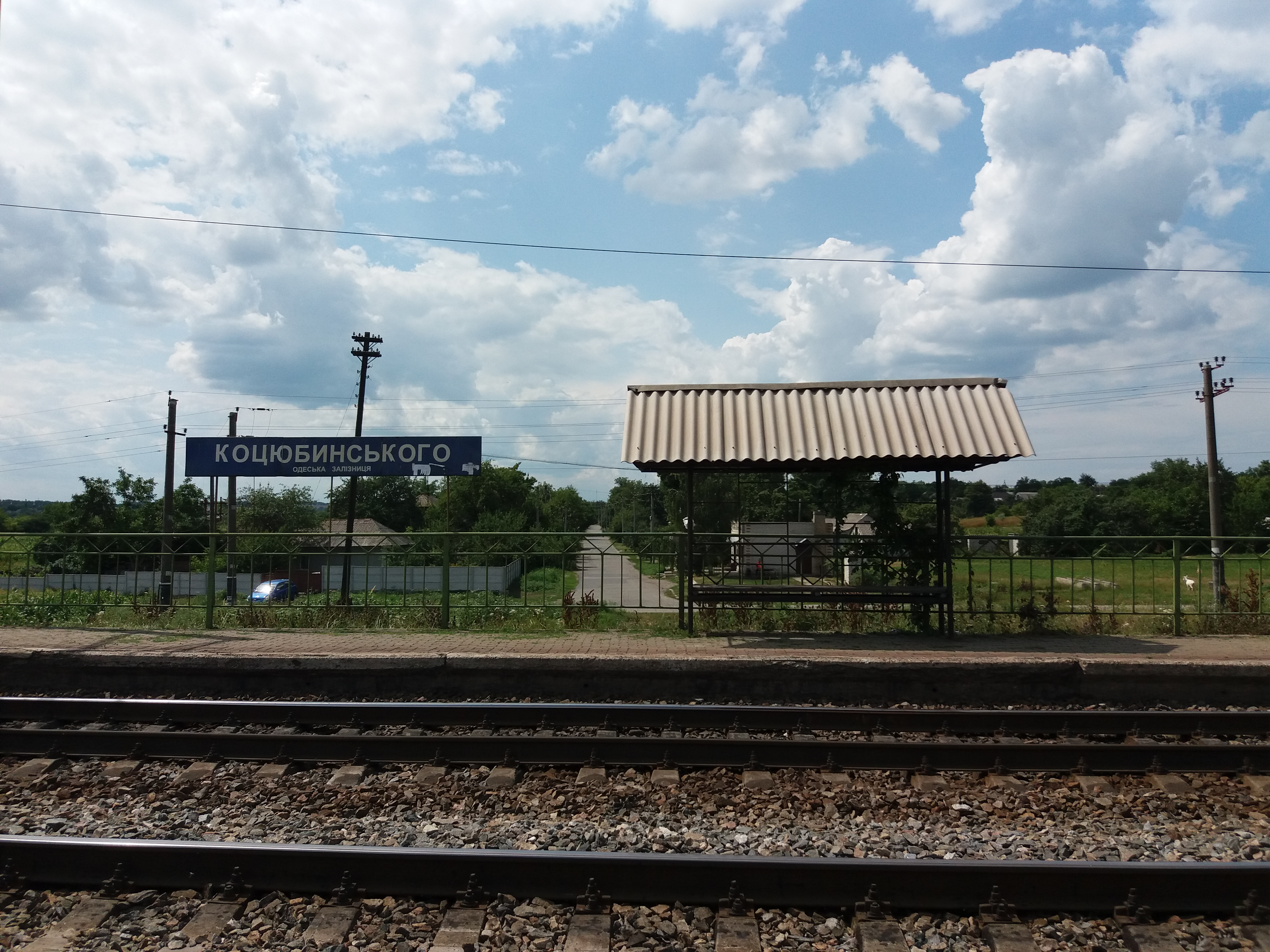 З. п. Коцюбинський (назва на інформаційній дошці – Коцюбинського) в Павлиші — зупинний пункт Знаменської дирекції Одеської залізниці.